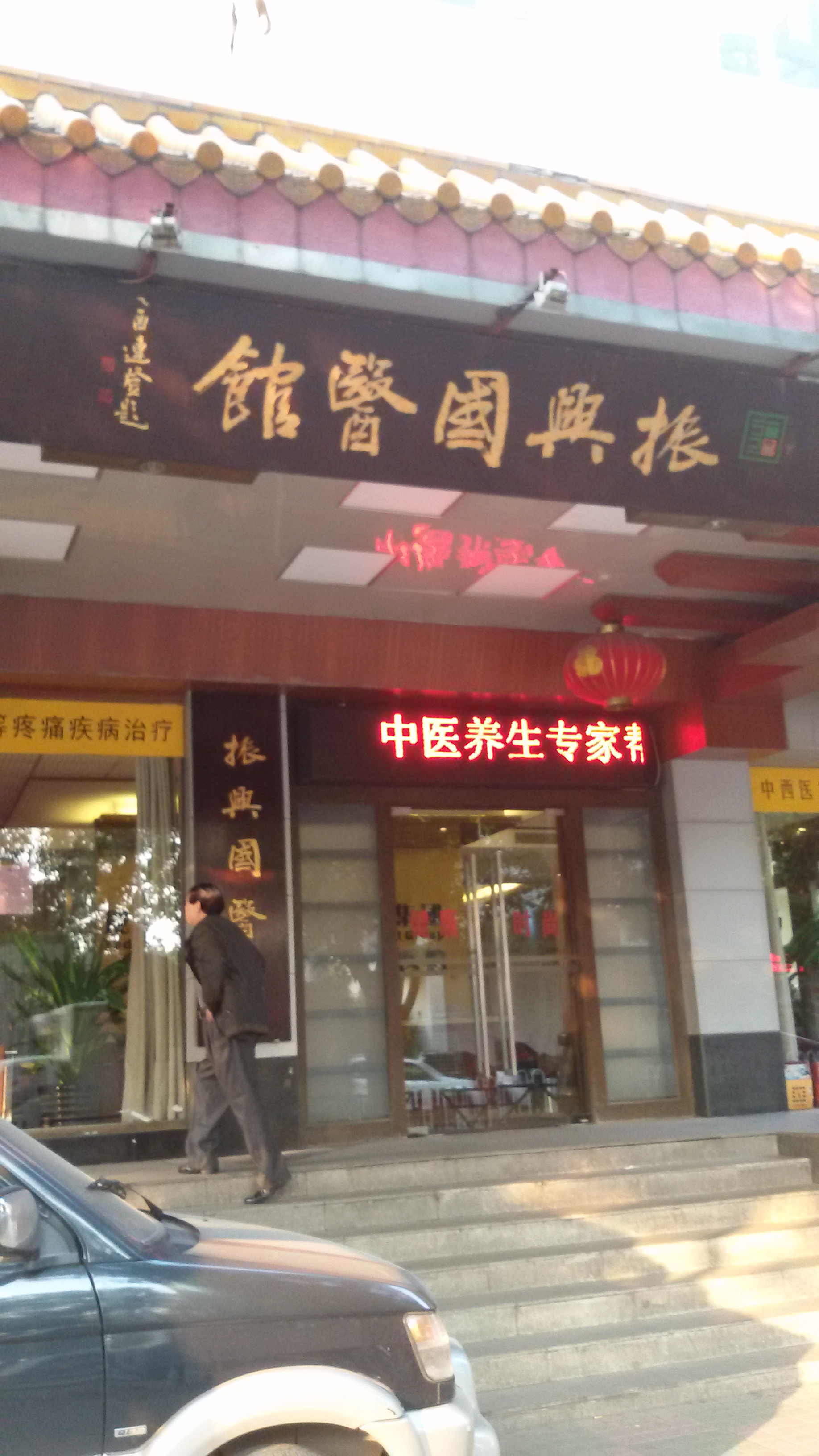 粵語: 振興國醫館